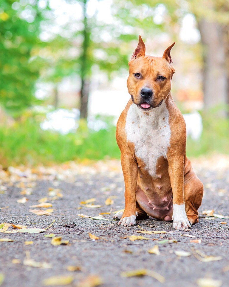 Выставка собак УФА